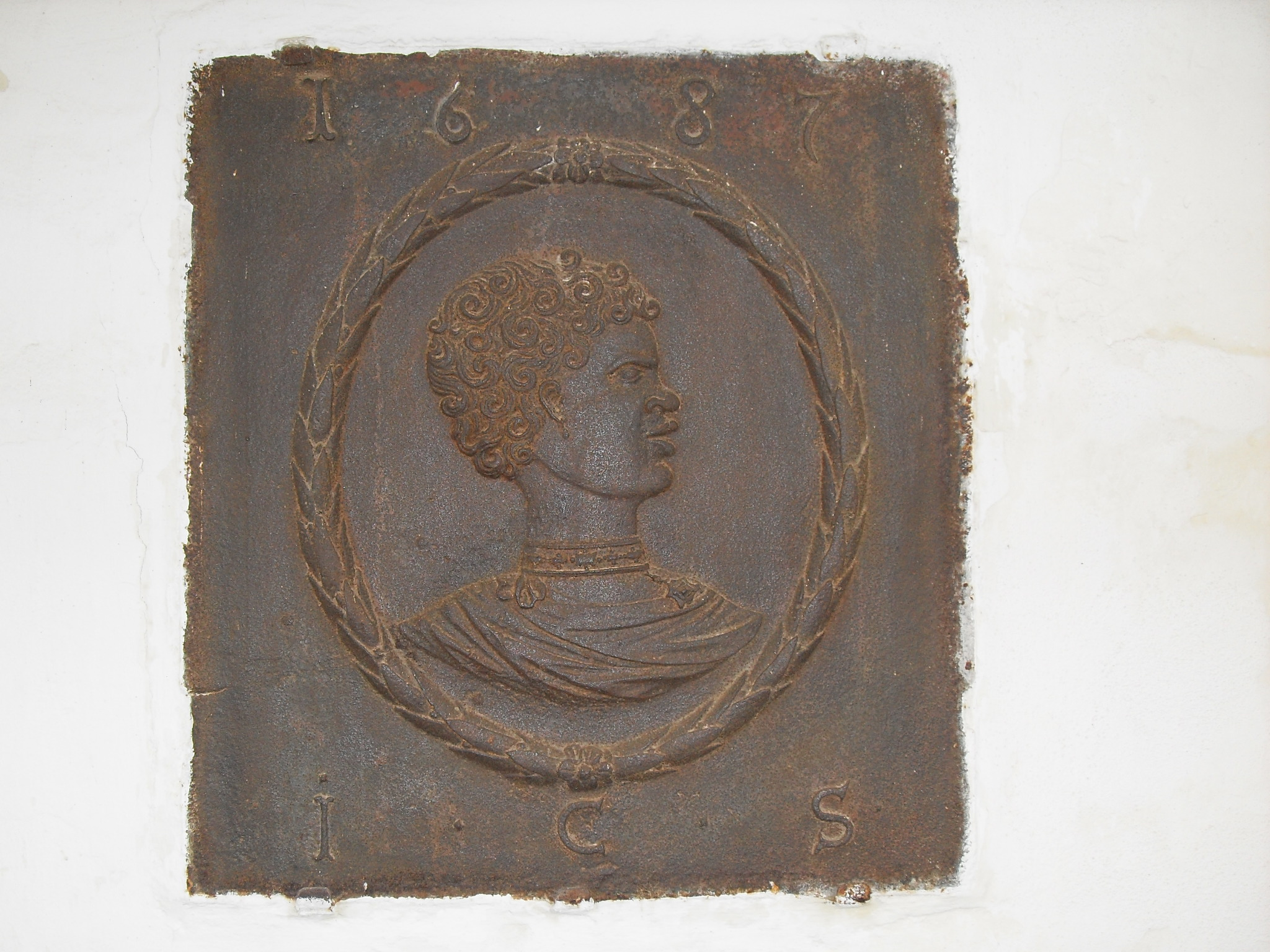 Innenhof, Detailː vermutlich Darstellung der türkisch stämmigen Maria Theresia.